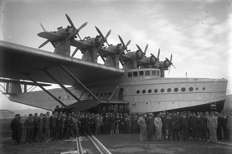 Der Weltrecord-Flug des Dornier-Riesenflugbootes"Do X" mit 169 Passagieren in Altenrhein a/Bodensee! (Neueste Aufnahmen unseres nach dort entsandten Sonder-Bild-Bericht-Erstatters!) Es ist das erste Mal, dass 169 Personen mit einem Luftfahrzeug befördert wurden; ausser dem mitgeführten Betriebsstoff für 1200 km. was einem Gesamtgewicht von ca. 300 Passagieren entspricht. Die 169 Passagiere, welche den Recordflug des "Do X" mitmachten, vor dem Flugboot.